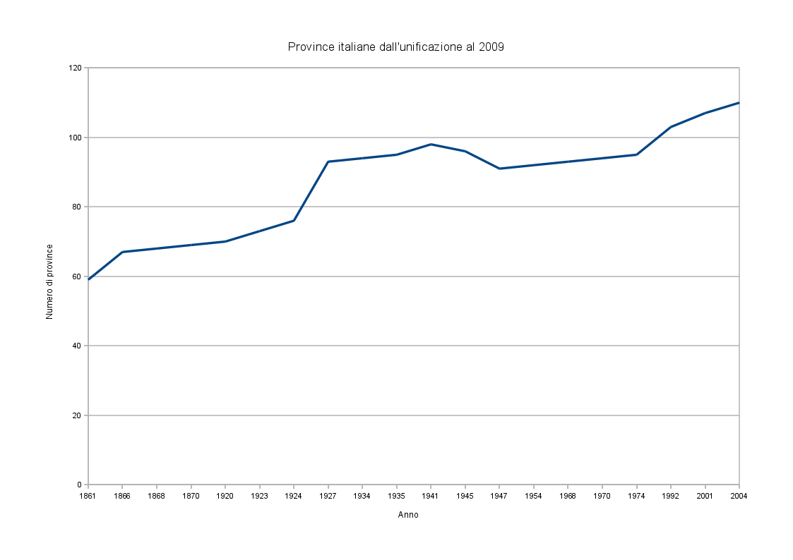 Numero di province in Italia dall'unificazione ad oggi.